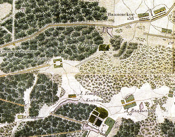 Участок. Топографическая карта окружности Москвы, снятая офицерами Квантирмейстерской части 1818 года. Гравирована и печатана в военно-топографическом бюро при главном штабе его импереторского Величества 1823 года.